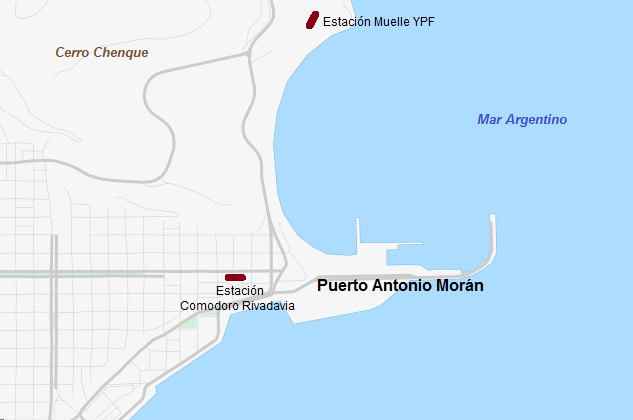 Plano del Puerto de Comodoro, hecho a base del OpenStreetMap y agregado de antiguas estaciones del ferrocarril cercanas, como asi tambien la ubicacion del puerto y el cerro Chenque.